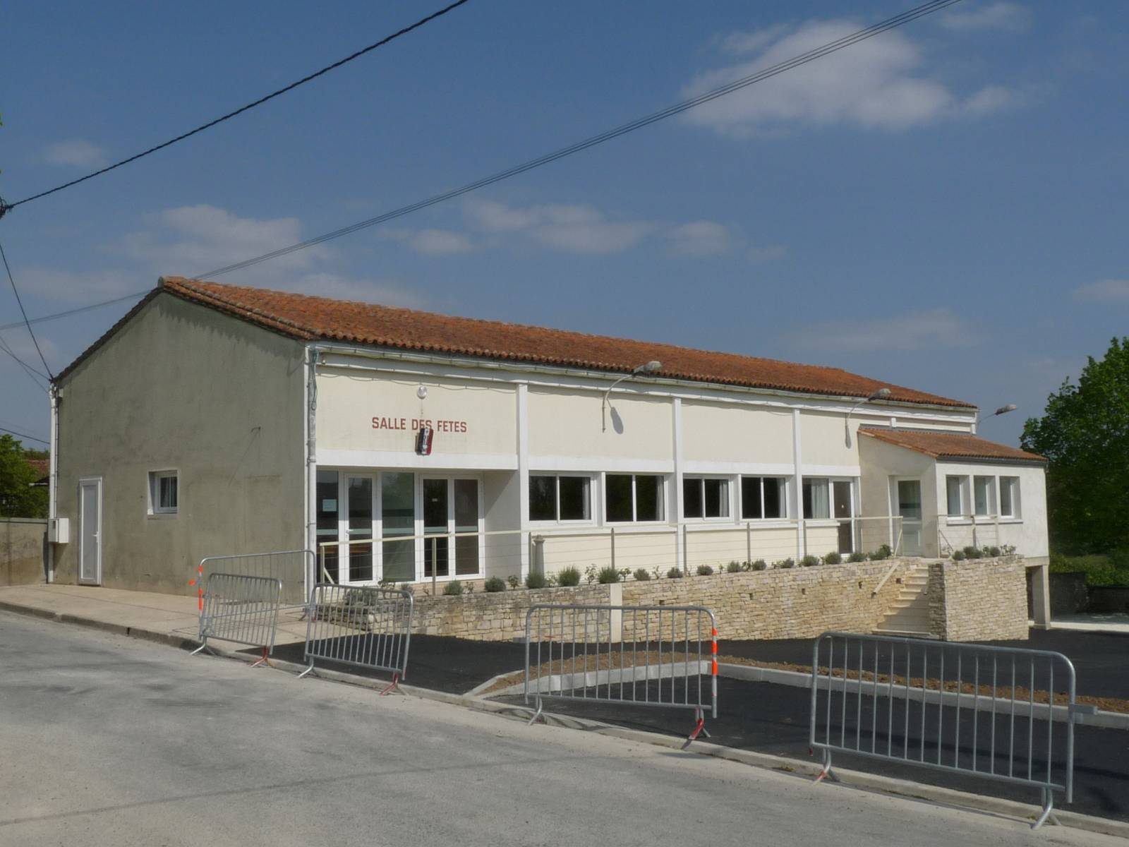 Salle des fêtes de Fleurac, Charente, France